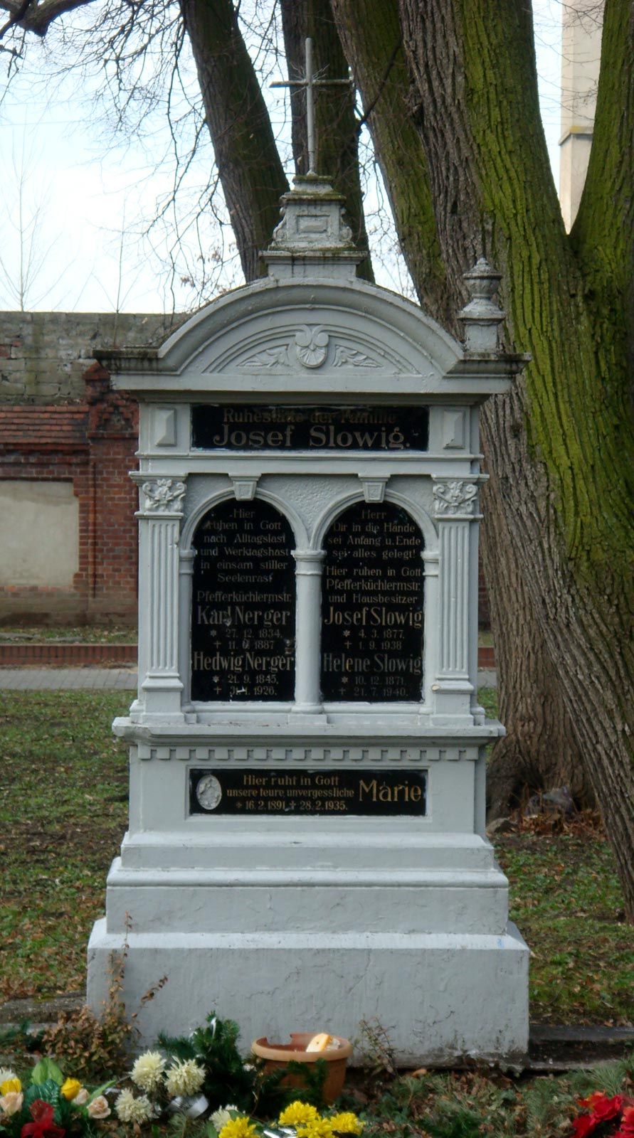 Nagrobek Josefa Slowiga na cmentarzu ewangelicko-augsburskim przy ul. Wrocławskiej w Opolu